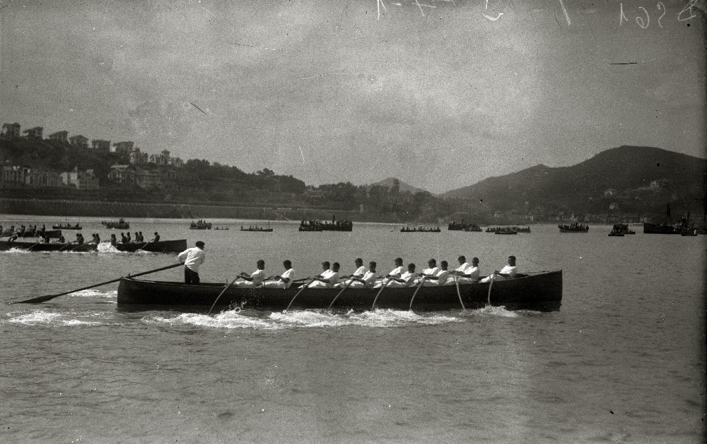 Título original: Regatas de traineras, Bandera de la Concha (7/13) Localización: San Sebastián (Guipúzcoa)